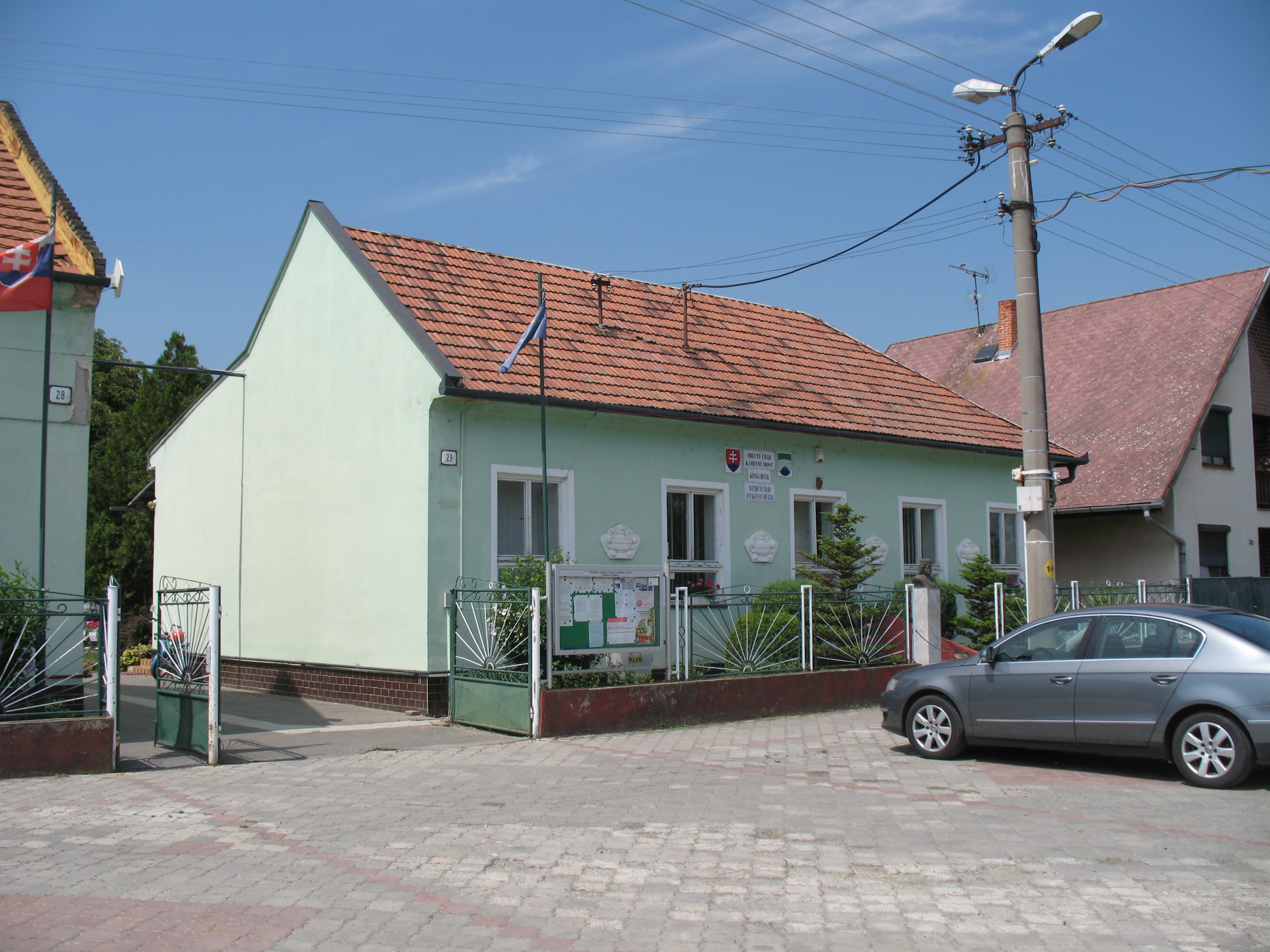 Kőhídgyarmat